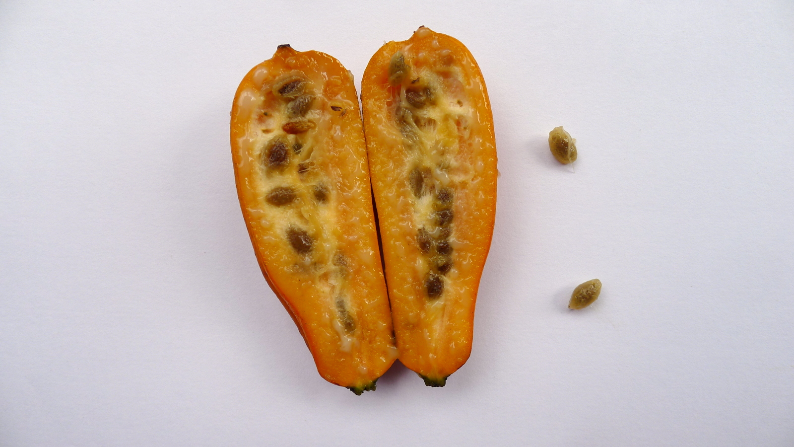 Jacaratia spinosa (Aubl.) A.DC.